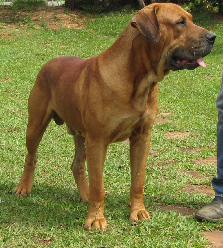 Bull-mastiff brasileiro